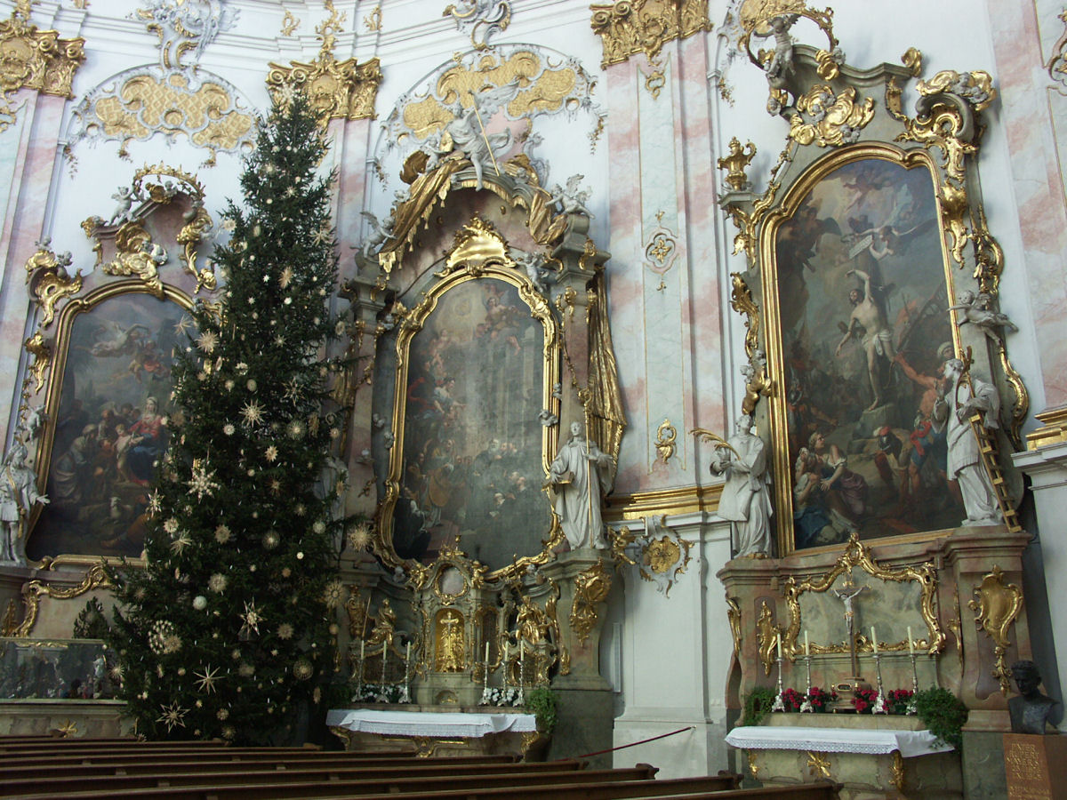 Ettal Abbey, Ettal, Germany